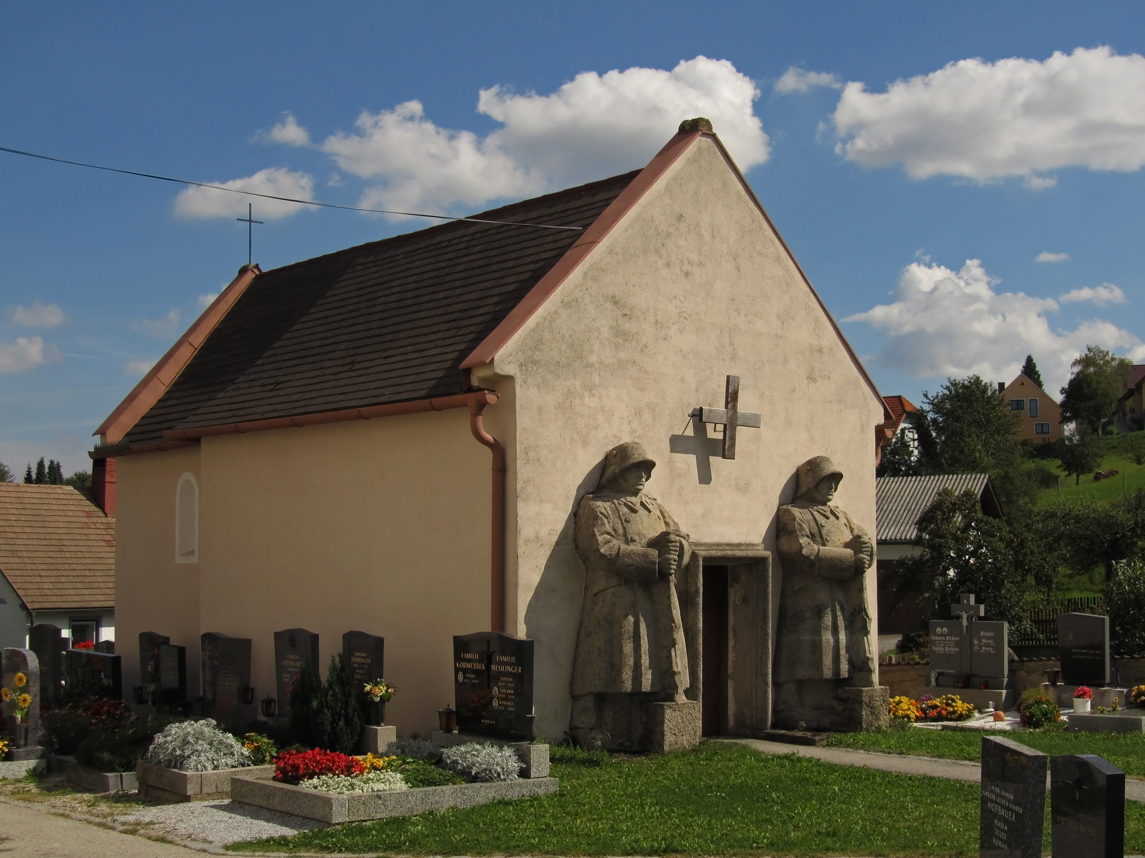 Die im 12. Jahrhundert erbaute romanische Kapelle mit eingezogenem Rechteckchor wurde 1932 renoviert und 1935 als Kriegerkapelle geweiht. Heute dient sie als Aufbahrungshalle.